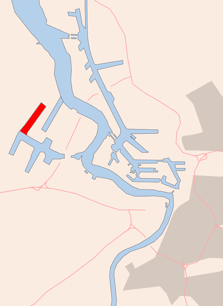 Antwerp , Doeldok